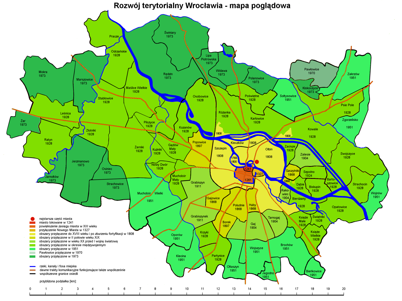 Rozwój terytorialny Wrocławia, mapa poglądowa rysunek wg planu miasta Wrocławia (PPWK 1979, ISBN 83-7000-019-3) z uwzględnieniem danych zawartych w Encyklopedii Wrocławia (Wyd. Dolnośląskie 2000, ISBN 83-7023-749-5) oraz na mapie M. Grügera (1911)